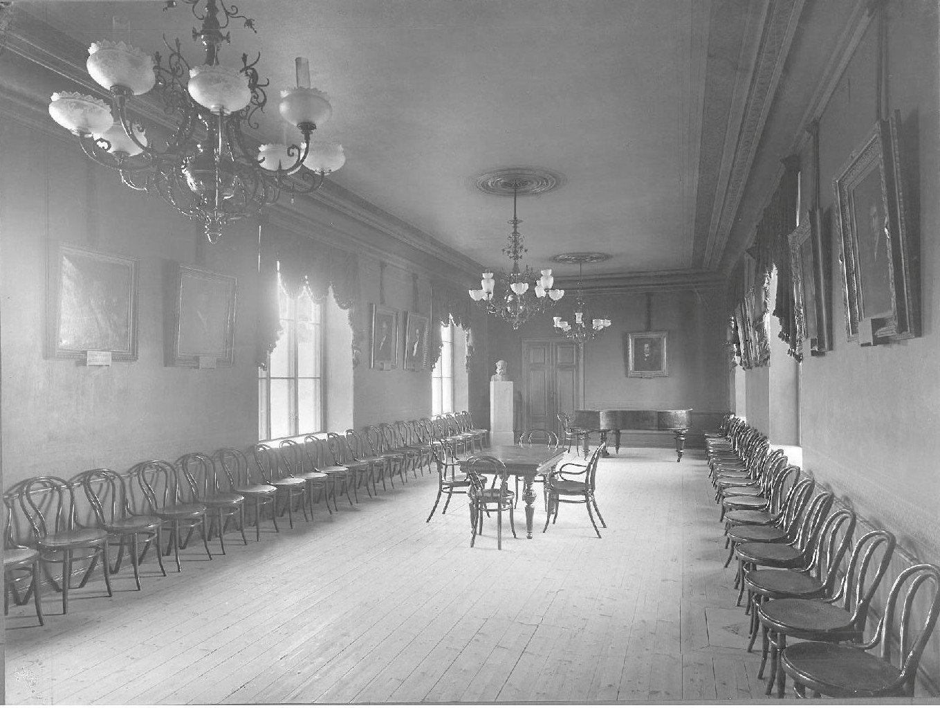 Värmlands nations tidigare nationsbyggnad.